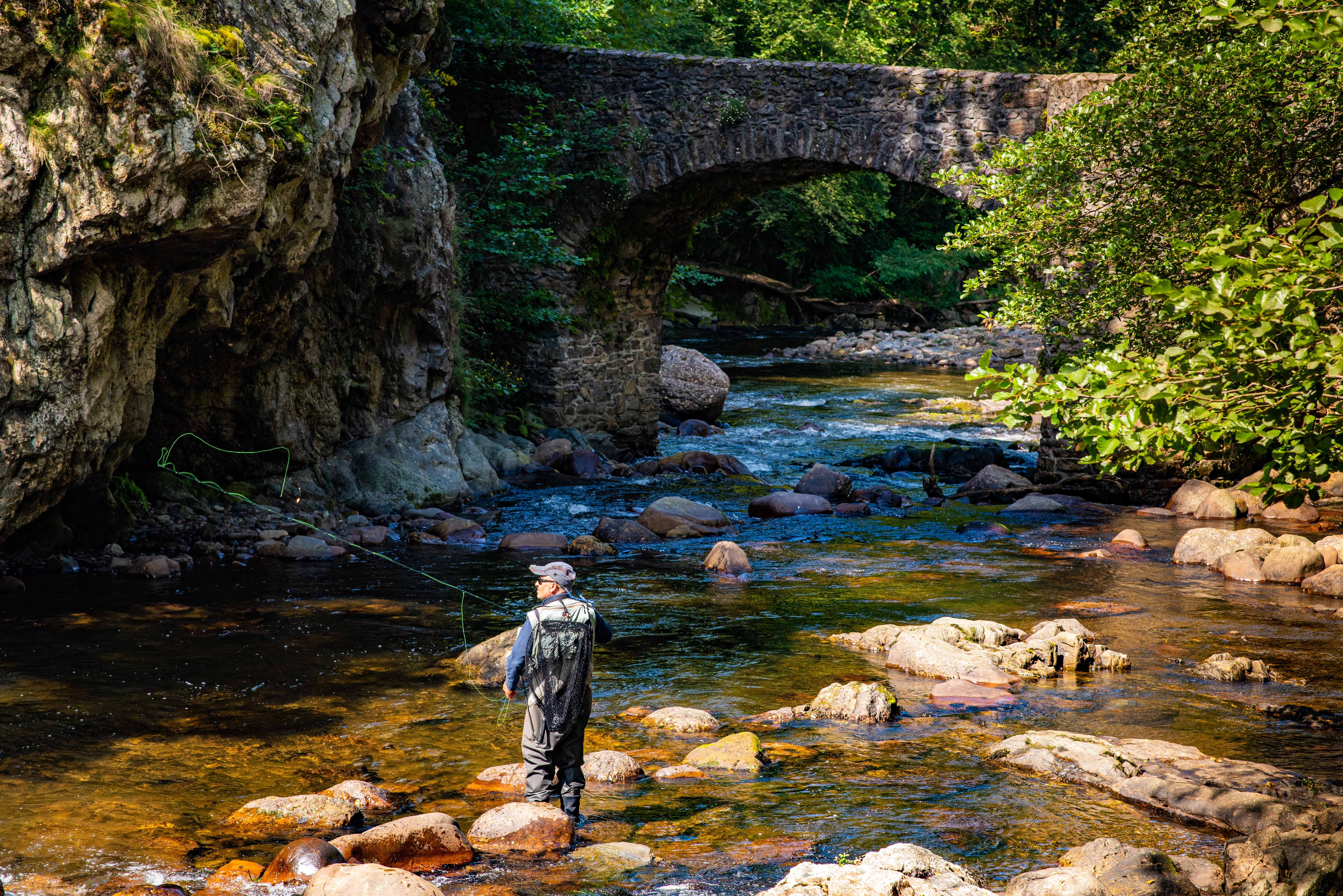 Zona de especial conservación del Río Leitzaran This is a photography of a Special Area of Conservation in Spain with the ID: ES2120013. Natura2000 entry, EEA entry